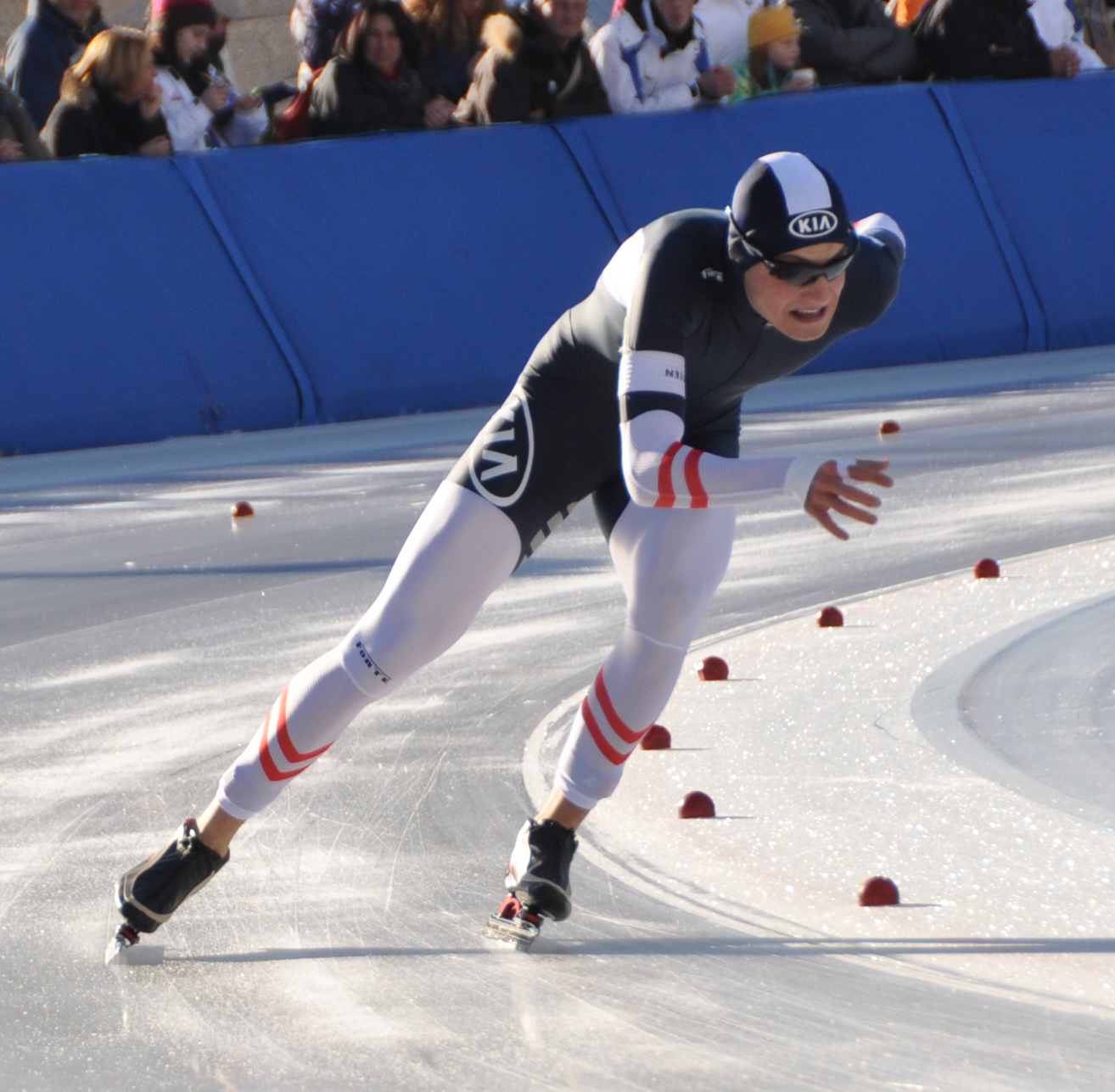 Linus Heidegger, JWC Klobenstein, Südtirol, 2015